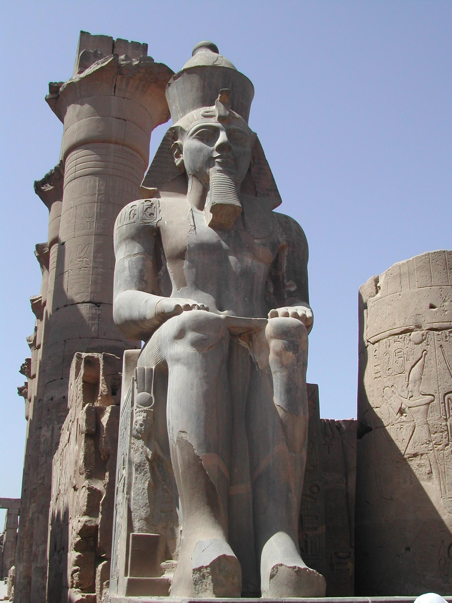 Egypten - Kolossalstatue vum Ramses II. beim Tempel vun Theben (haut: Luxor).